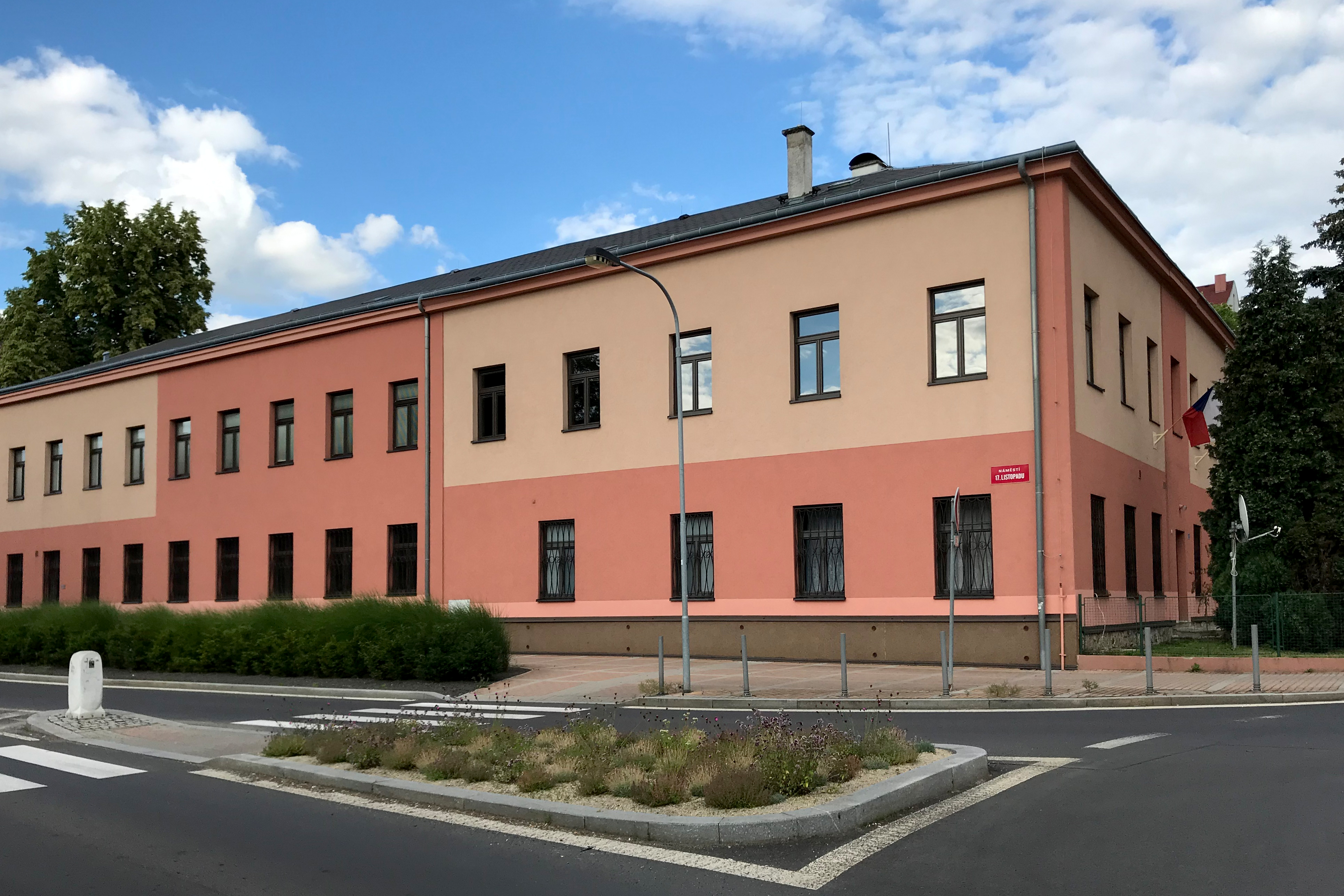 Budova Státního okresního archivu v Karlových Varech na náměstí 17. listopadu 100/2